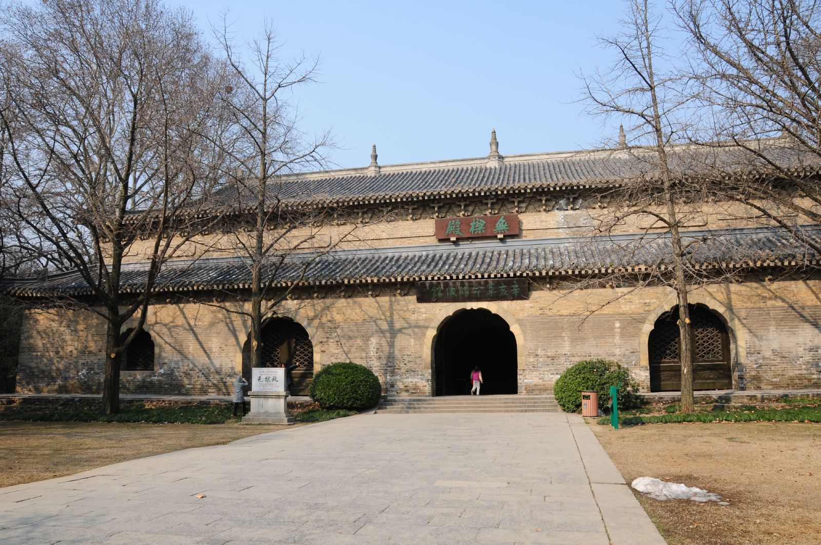 南京无梁殿。WuLiangDian, Nanjing, China